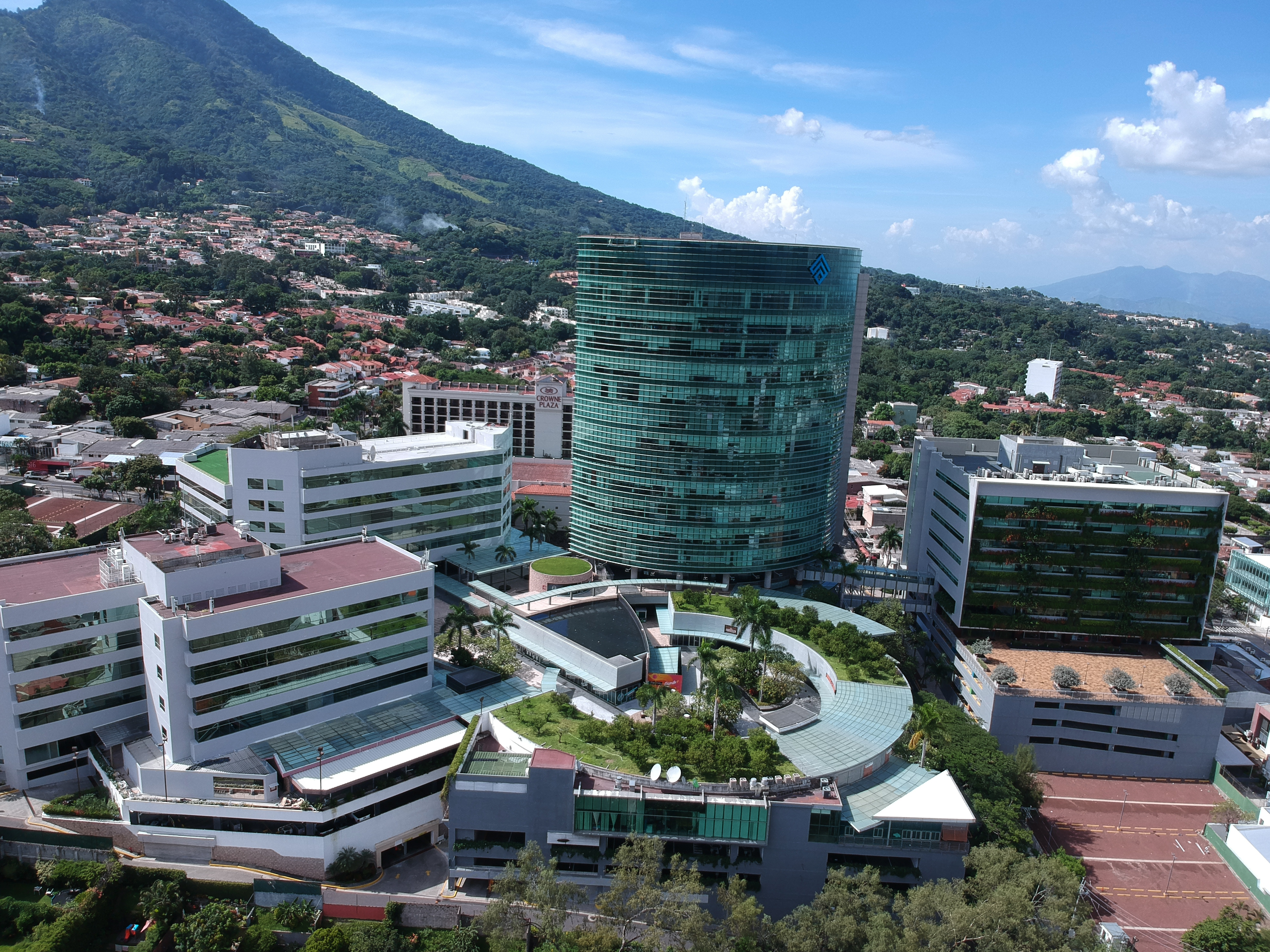 Complejo Financiero World Trade Center